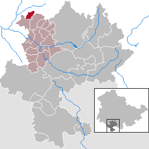 Schmeheim in Thuringia - district Hildburghausen